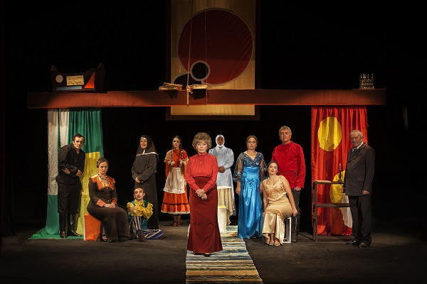 МАТЬ. М. Горький режиссёр Константин Дубинин